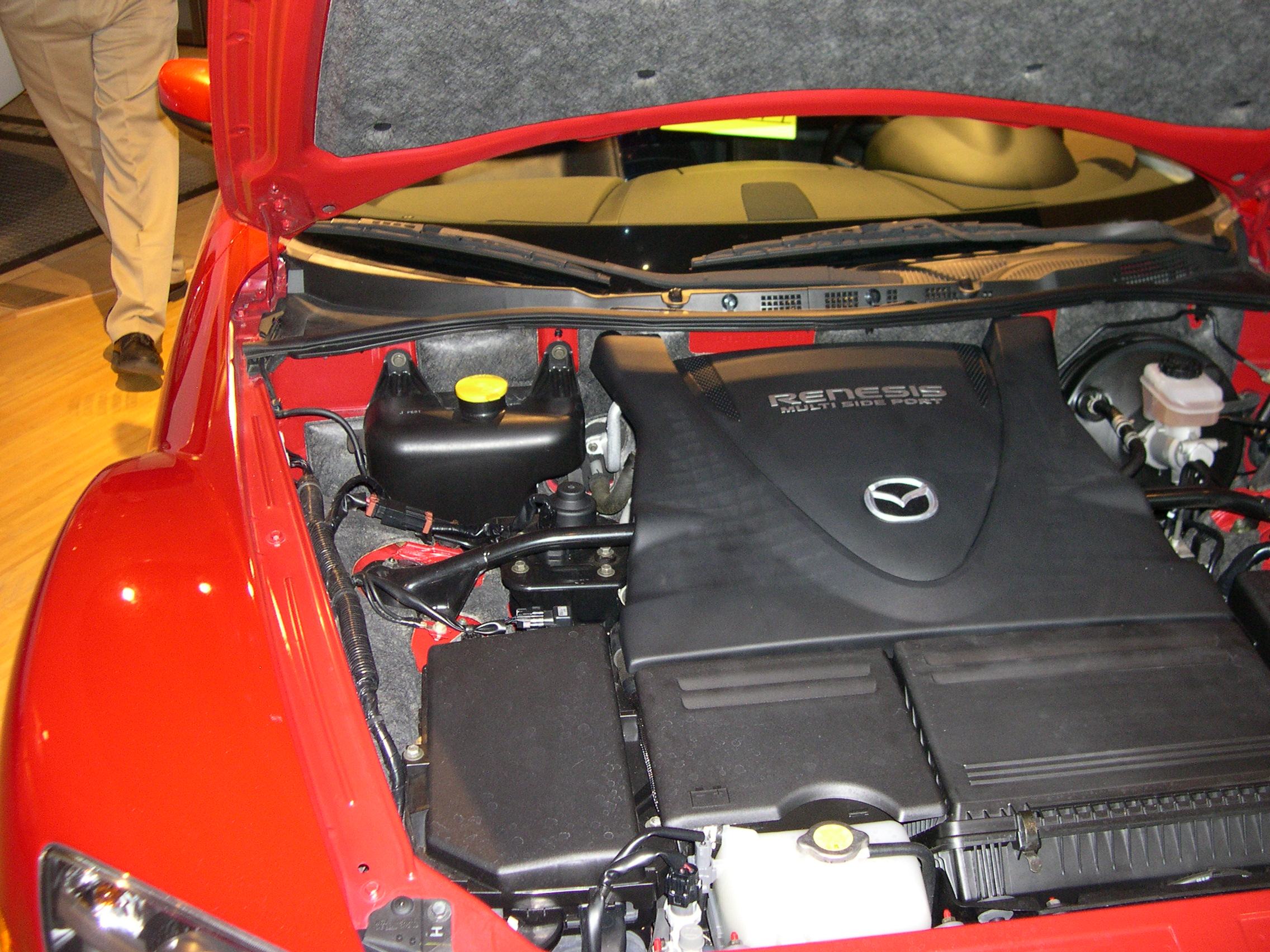 2005 Mazda RX-8